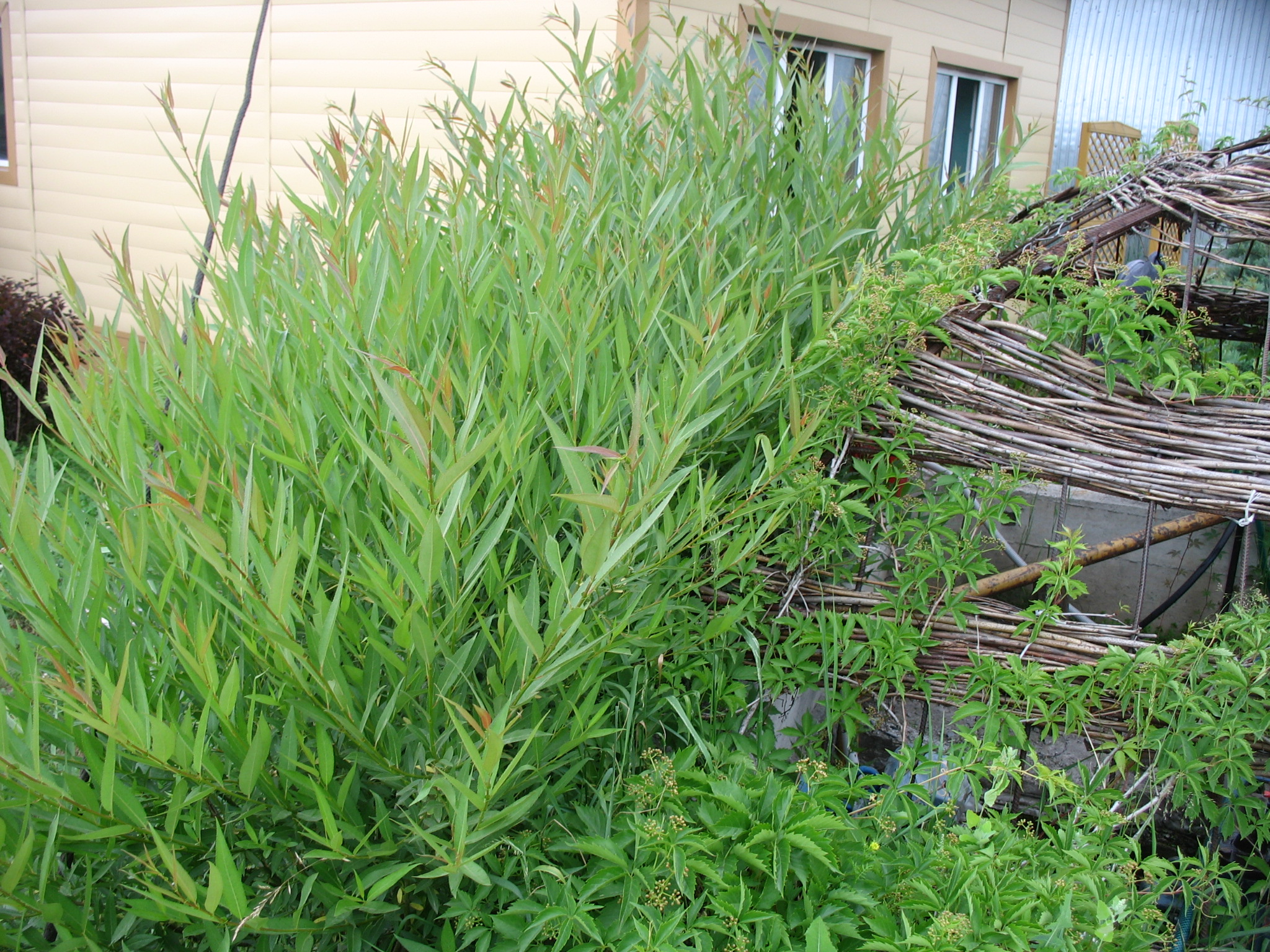 Ива тонколистная, Алтай, с. Алтайское, дендрарий